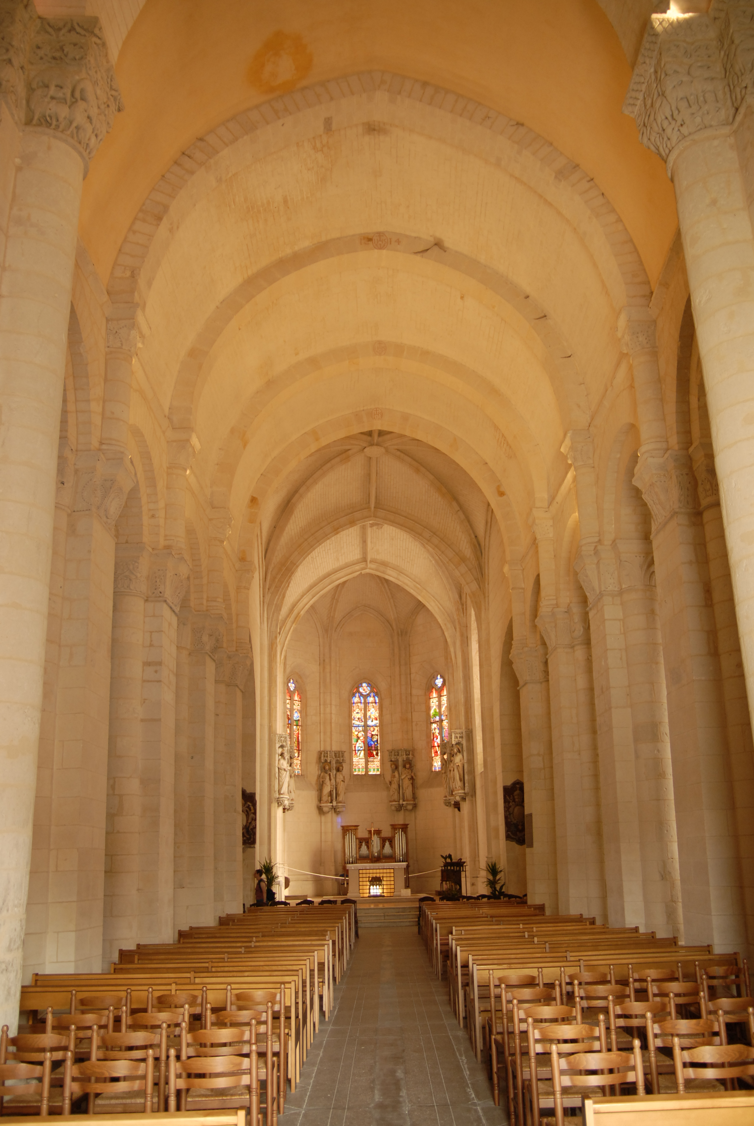 St.-Eutrope, Saintes, Oberkirche, Umgangschor zum Altar